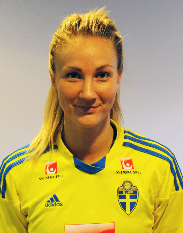 Emma Lundh